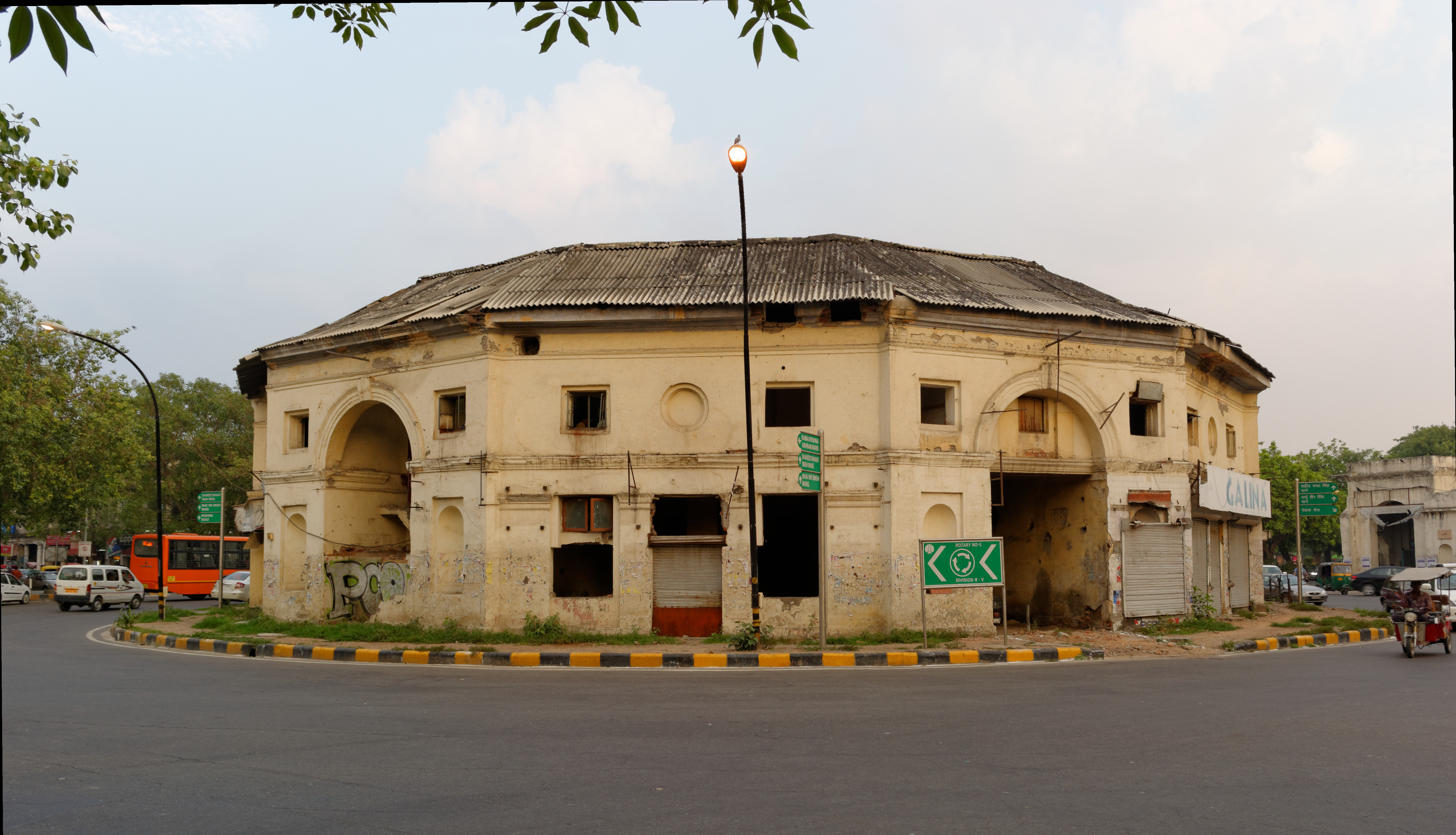 Gol Market, New Delhi